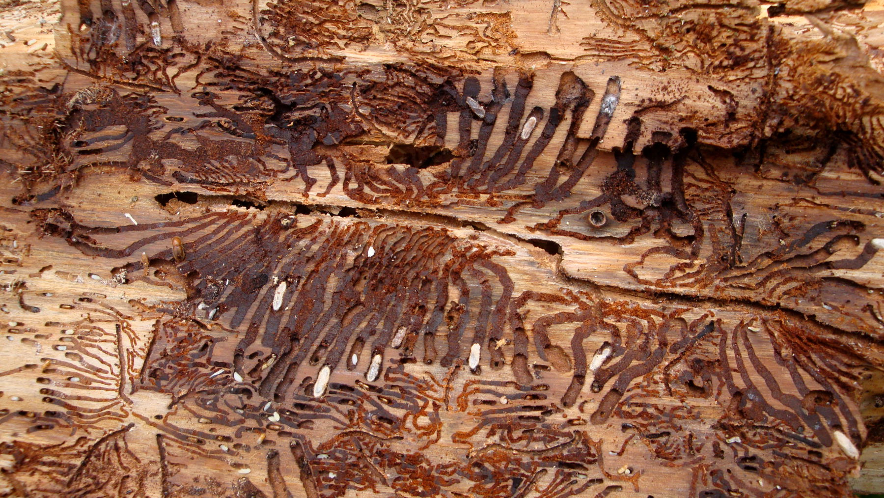 Larvengänge des Buchdruckers nach manueller Entfernung der Baumrinde einer Fichte